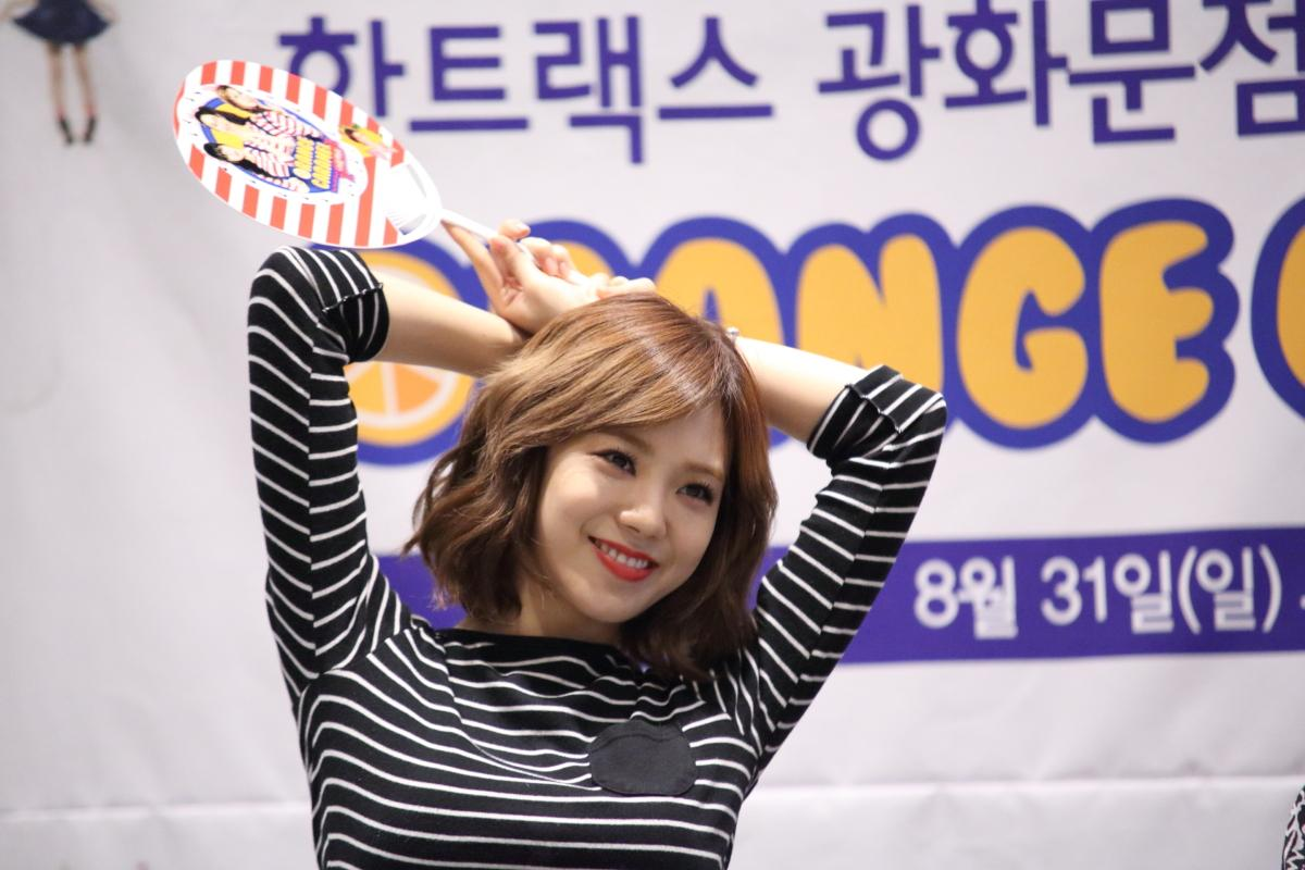 140831. 오렌지 캬라멜 팬 사인회